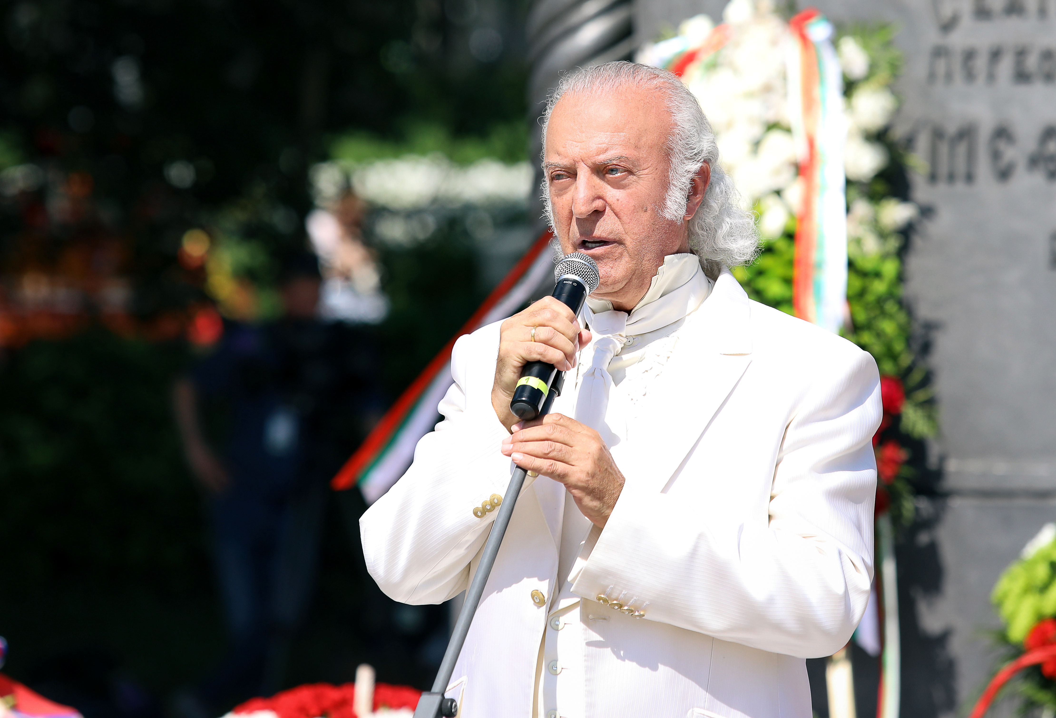 Илья Резник- советский и российский поэт-песенник, Народный артист России. День славянской письменности и культуры у памятника Кириллу и Мефодию в Москве.